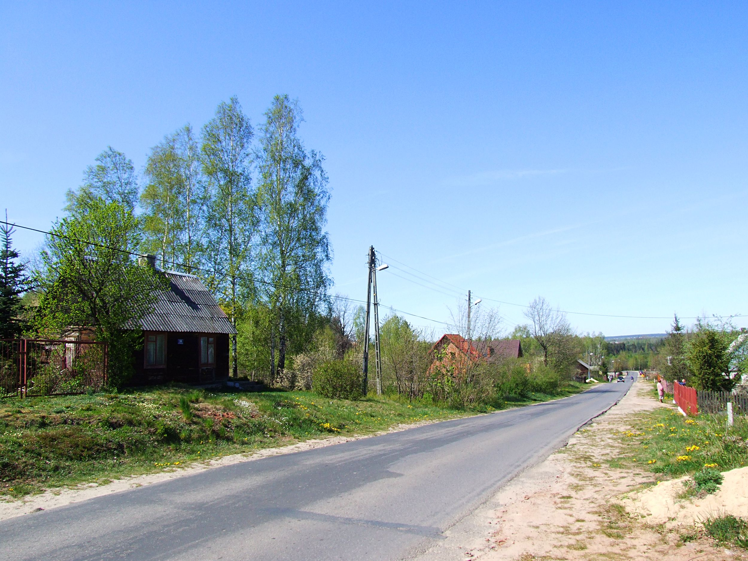 Majków